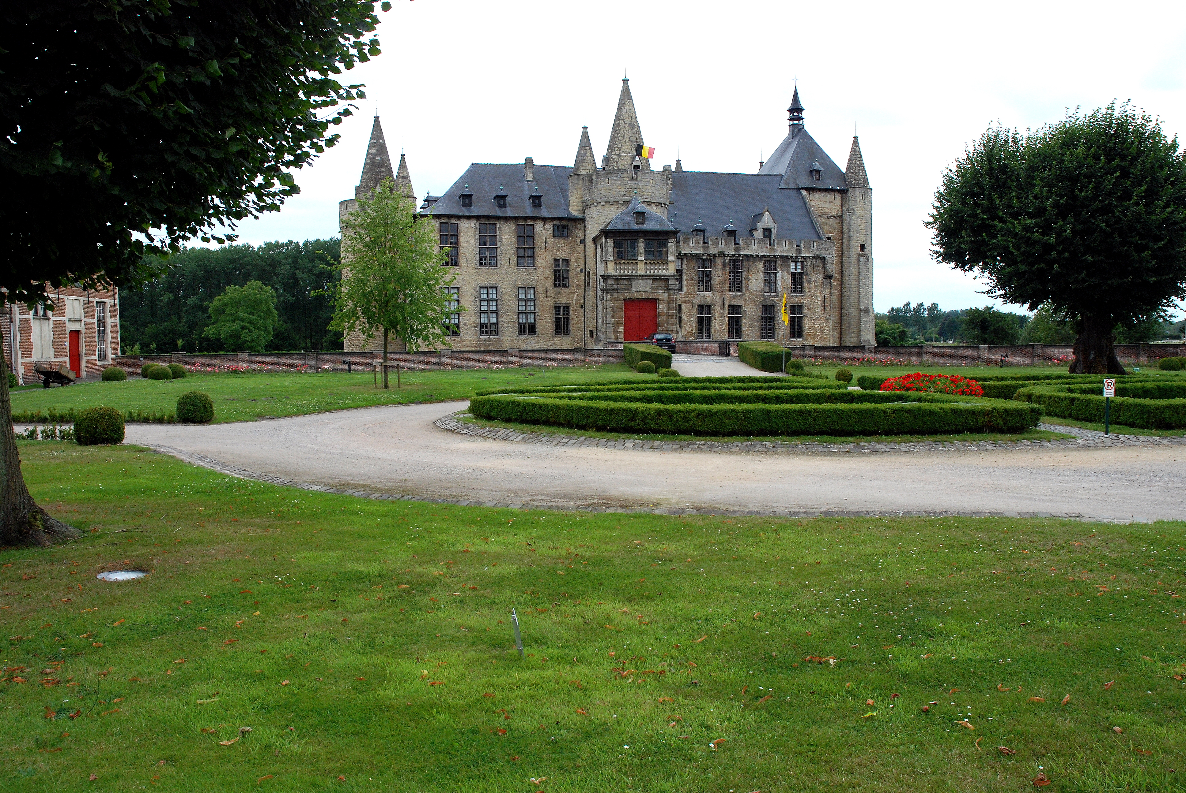 Kasteel van Laarne (België)